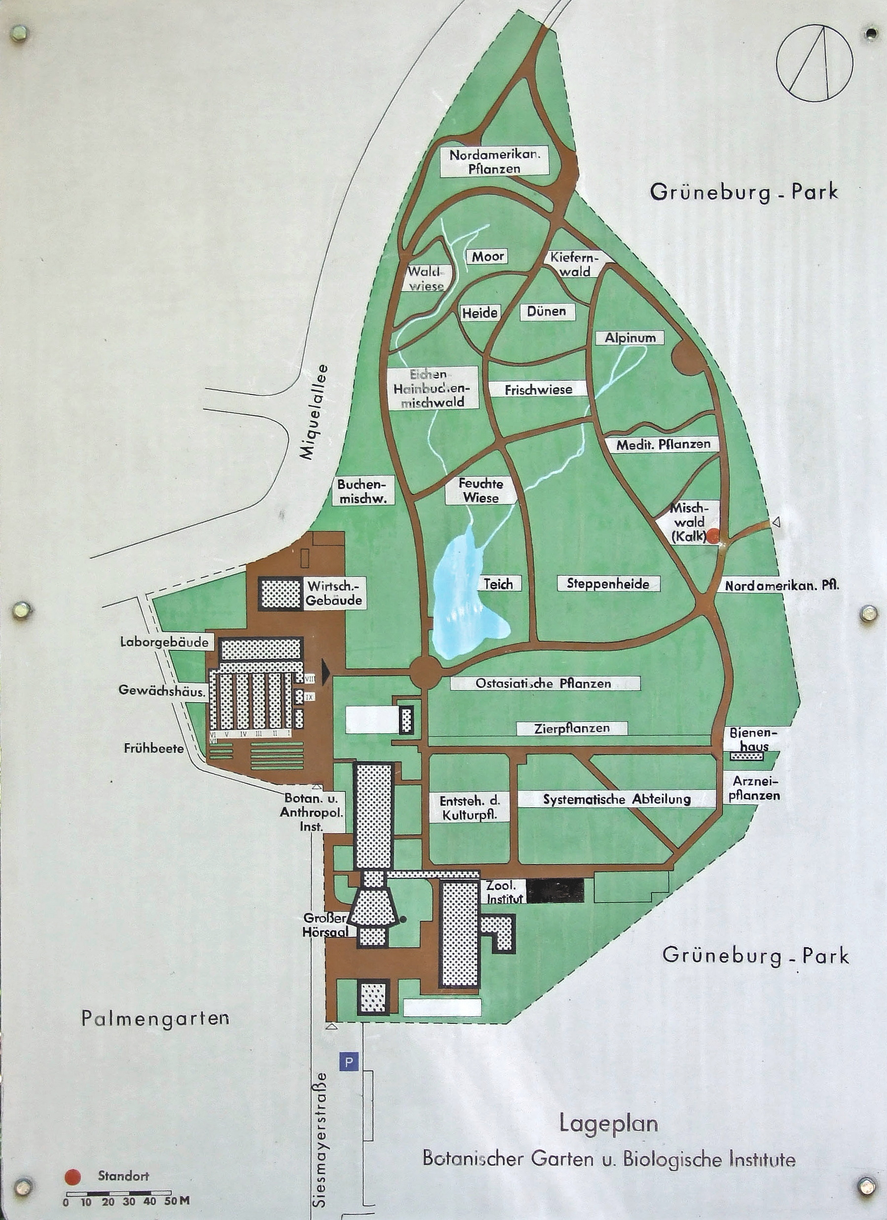 Plan des Botanischen Gartens Ffm, Siesmayerstraße